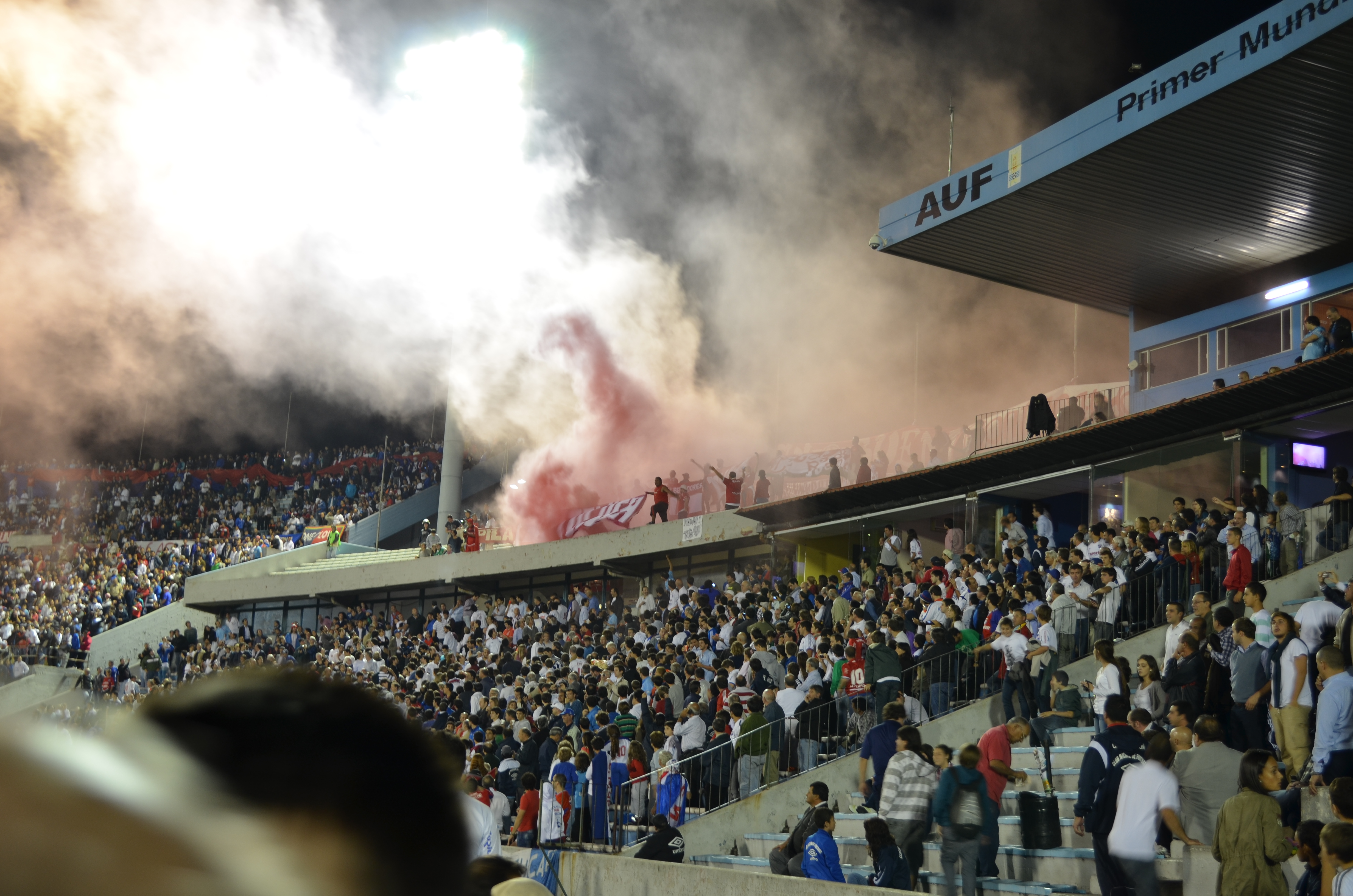 Afición de Toluca en el Estadio Centenario, en el encuentro ante Nacional por la Copa Libertadores 2013